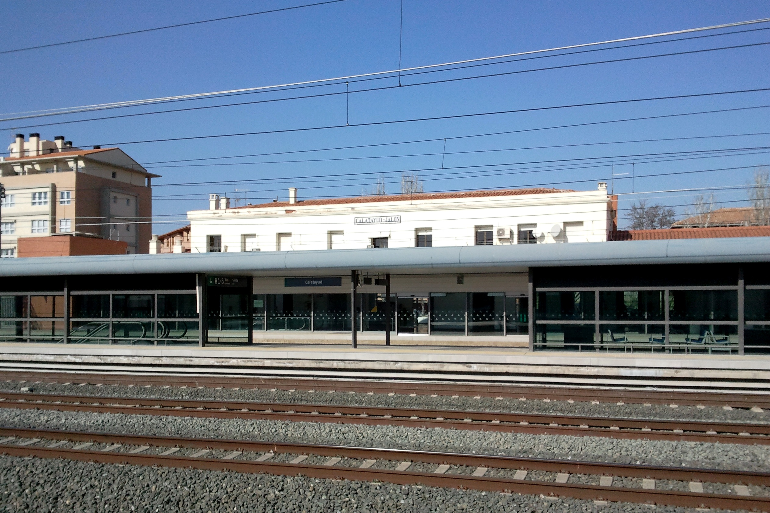 Estación de Calatayud, fachada interior